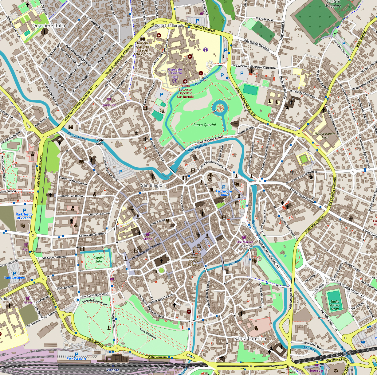 Mappa del Cemtro storico di Vicenza (OpenStreetMap)